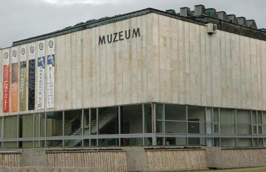 Muzeum Początków Państwa Polskiego z zewnątrz